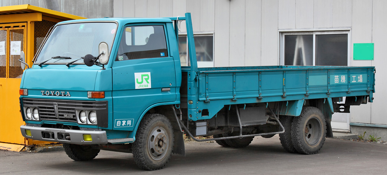 Toyota Dyna 2.0 tonner (RU30)